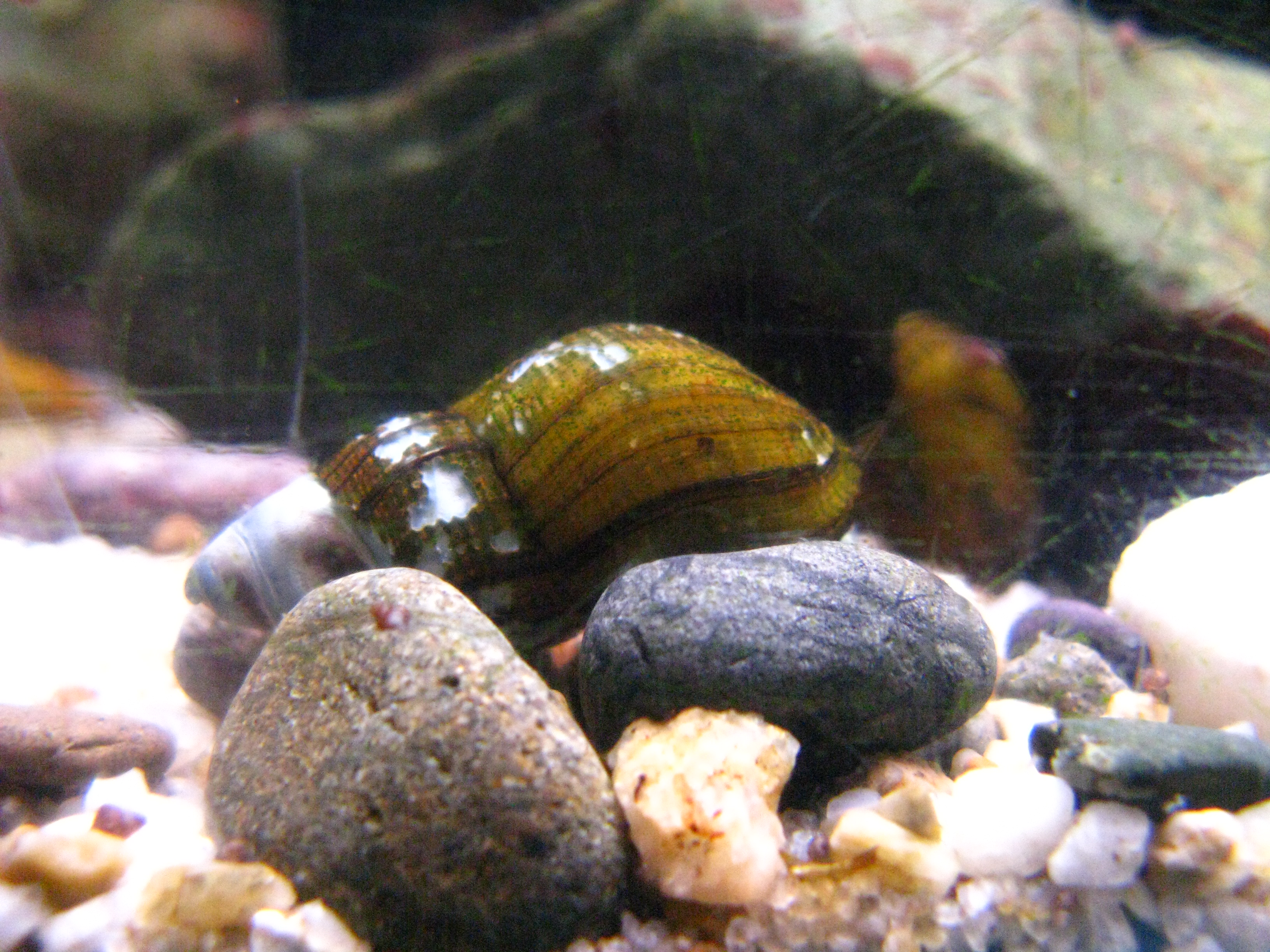 Scientific name Semisulcospira kurodai